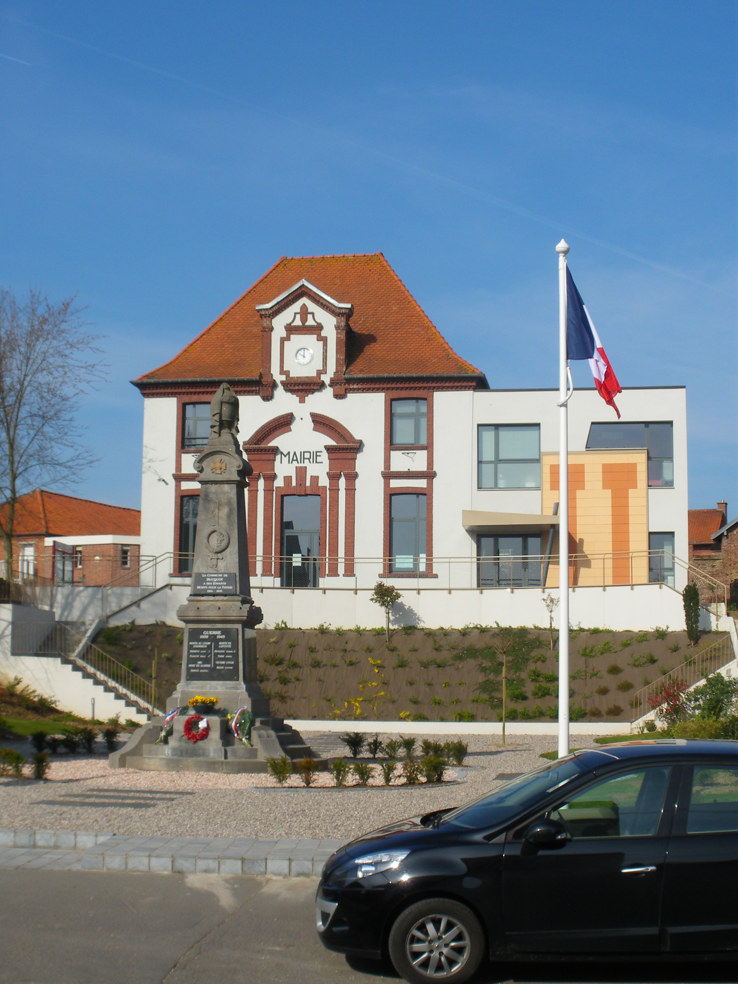 Vue du monument aux morts et, derrière lui, de la mairie de Bucquoy.